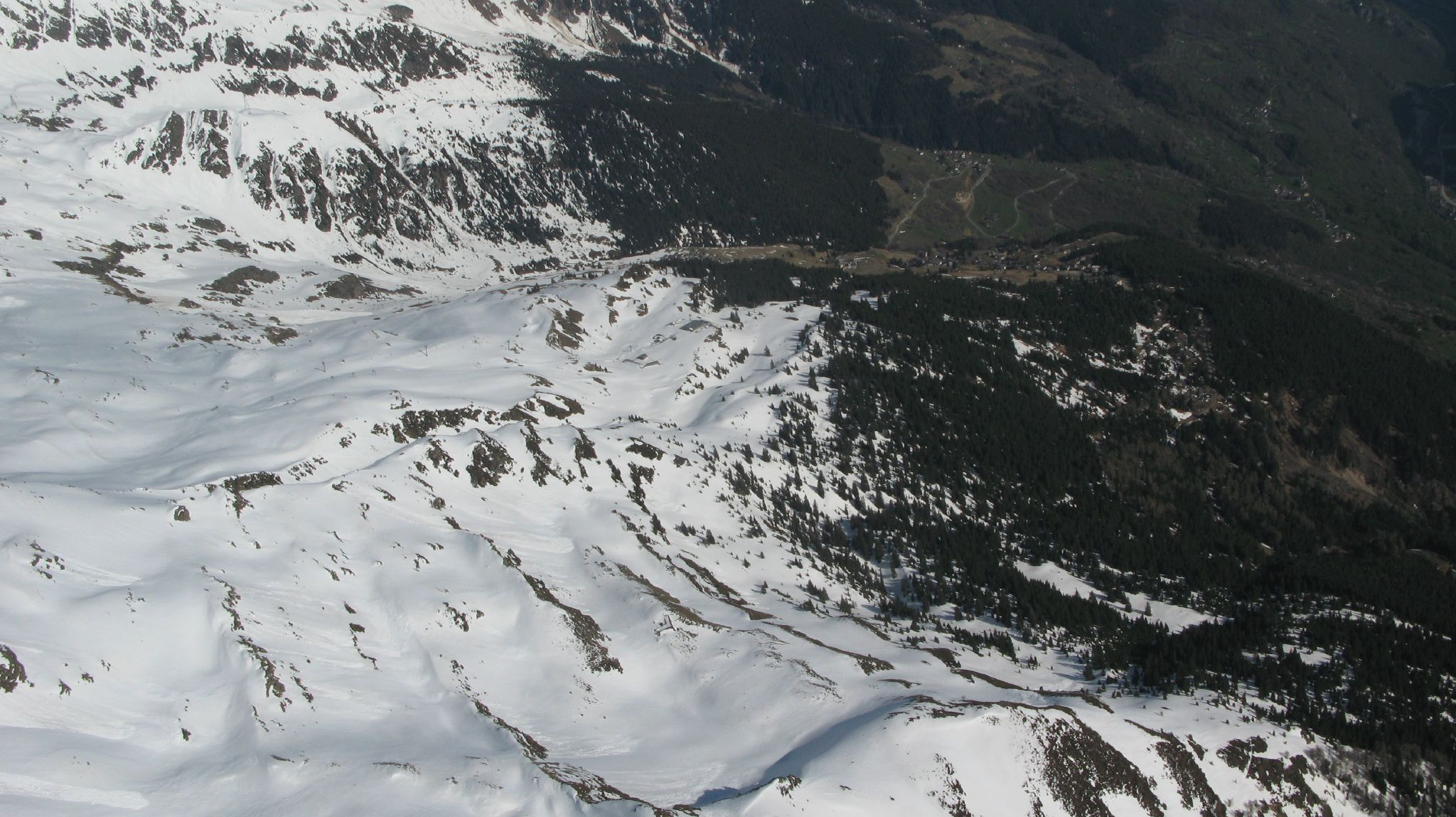 Carì, Ticino (aerial view)